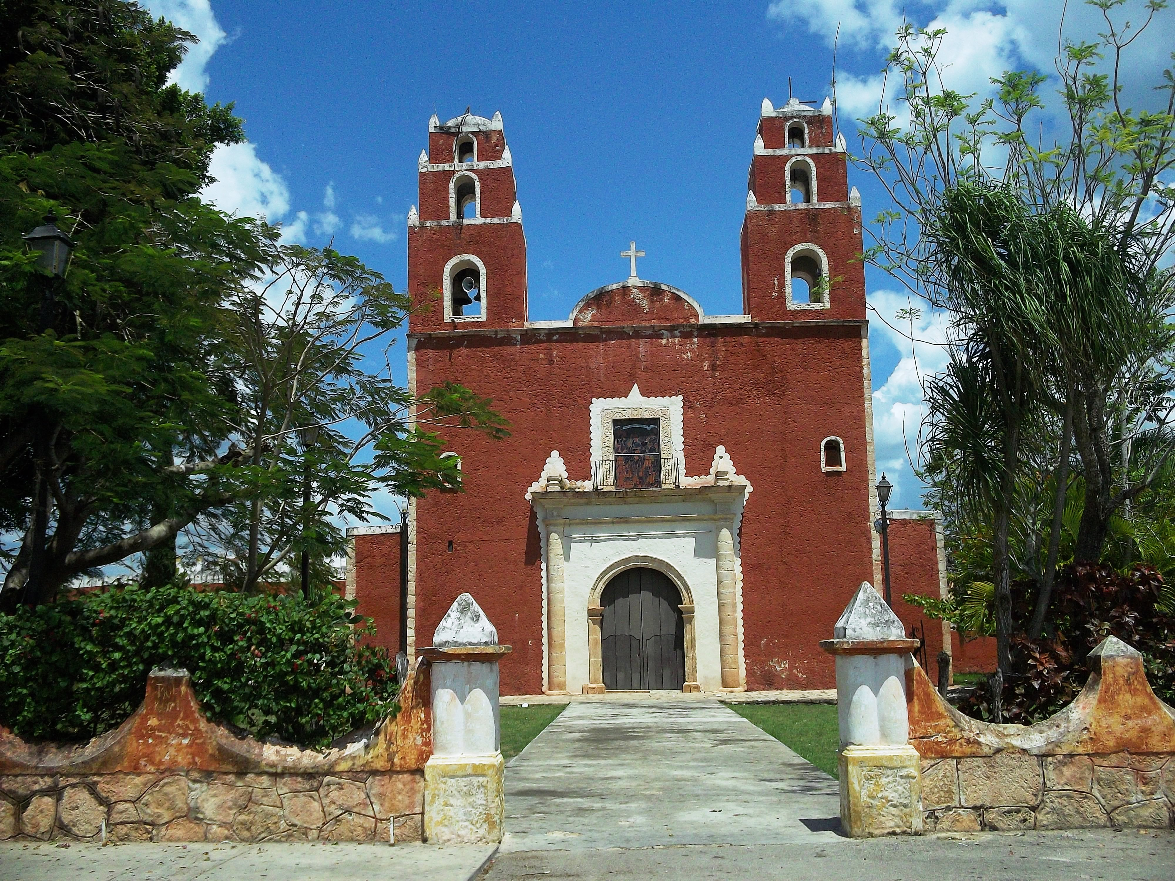 Iglesia de Temax. Yucatán.